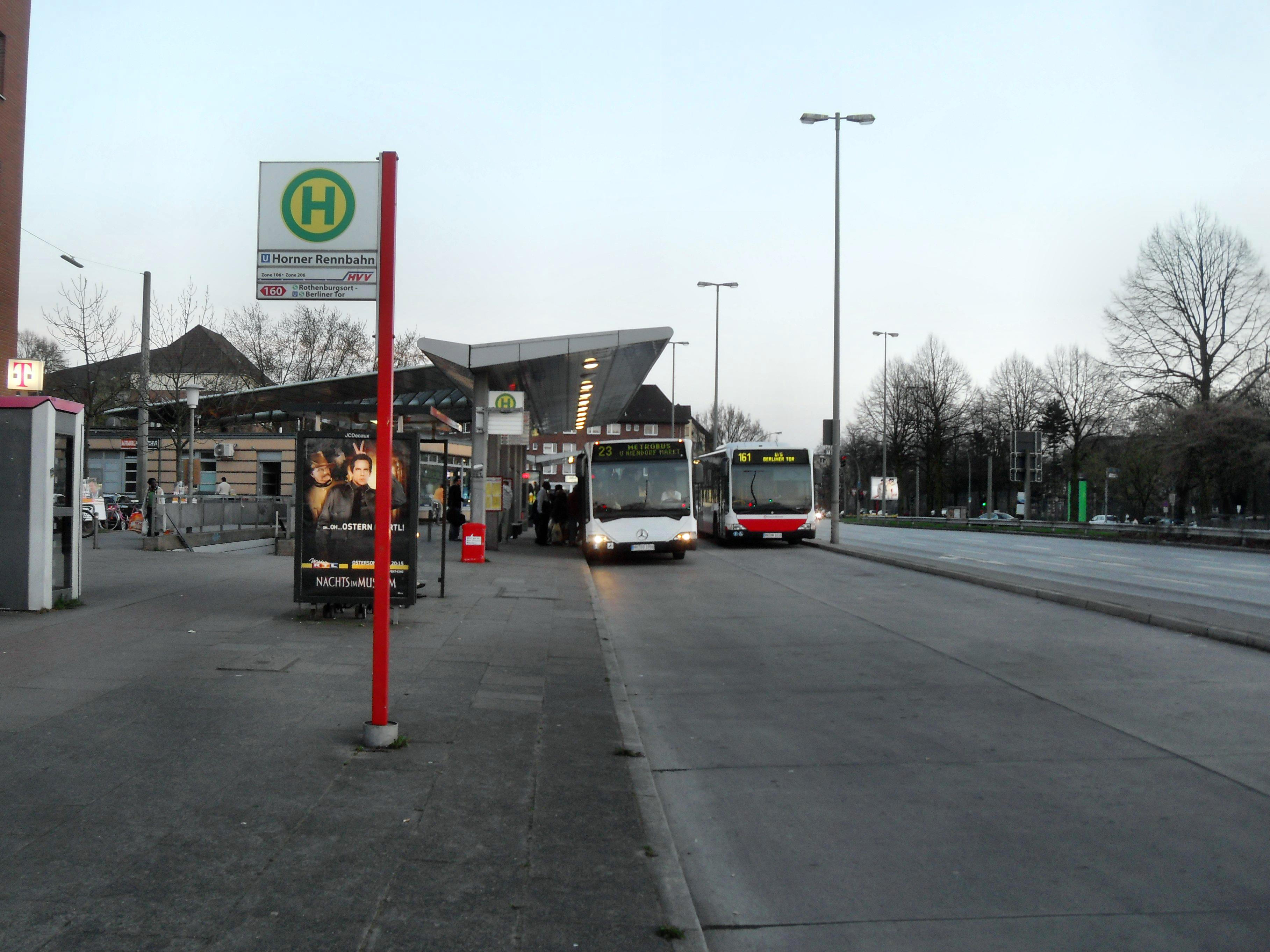 Die Bushaltestelle des U-Bahnhofs Horner Rennbahn auf der U-Bahnlinie 2 der U-Bahn Hamburg in Hamburg (Deutschland)